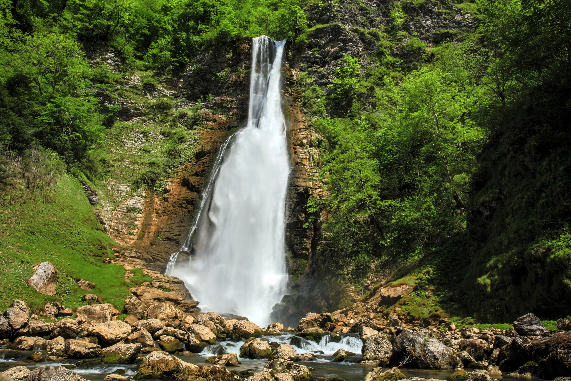 ონიორის ჩანჩქერისა და ტობის პირველი მღვიმის ბუნები ძეგლები ღირშესანიშნაობა: ბუნების ძეგლების კომპლექსი წარმოადგენს ტობა პირველის მღვიმისა და მისგან გადმომავალი ონიორეს ჩანჩქერის ერთობლიობას, რომელიც იშვიათ და ულამაზეს სანახაობას ქმნის. მღვიმე გამომუშავებულია ზედაცარცულ შრეებრივ კირქვებში. შესასველეი (12X5 მ) ქარაფის გასწვრივ იხსნება. შესასვლელიდან 70 მეტრში 21 მ სიმაღლის მიწისქვეშა ჩანჩქერია, სადაც ჭერის სიმაღლე 30 მეტრზე მეტია. ცალკეულ ადგილას გვირაბის სიგანე 12-15 მ აღწევს. მღვიმიდან გამომავალი მიწიქვეშა მდინარე 15 მეტრში, 67 მ სიმაღლის ონიორეს ჩანჩქერს წარმოქნის. მდებარეობა: მარტვილის მუნიციპალიტეტი, სოფ. მეორე ბალდის ჩრდილო-აღმოსავლეთით, მდ. აბაშის მარჯვენა შენაკადის ტობას ხეობა, 680 მეტრი ზღვის დონიდან. კოორდინატები: N42 28.643 E42 27.520